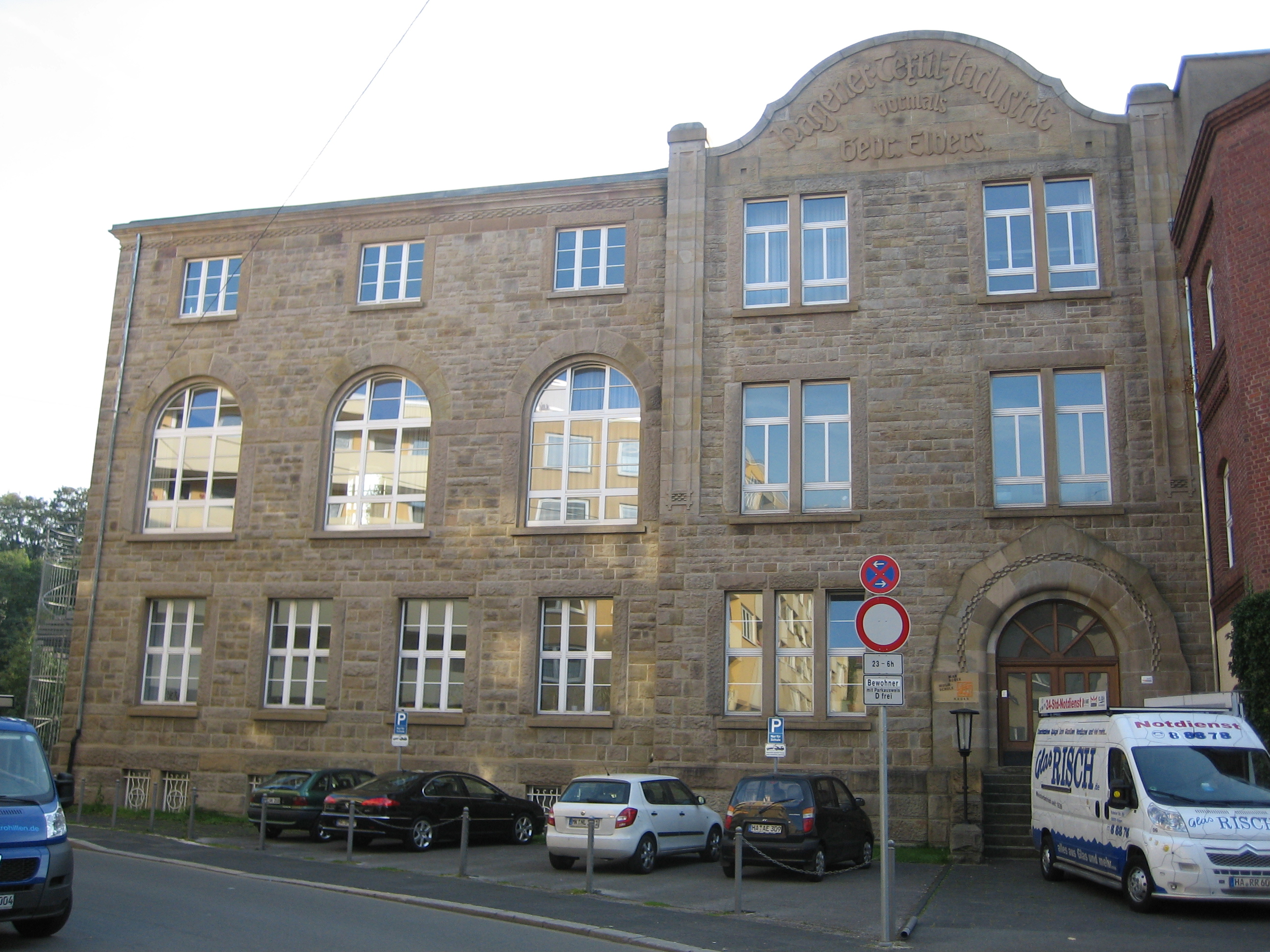 ehemaliges Verwaltungsgebäude der Firma Elbers in Hagen This is a photograph of an architectural monument.